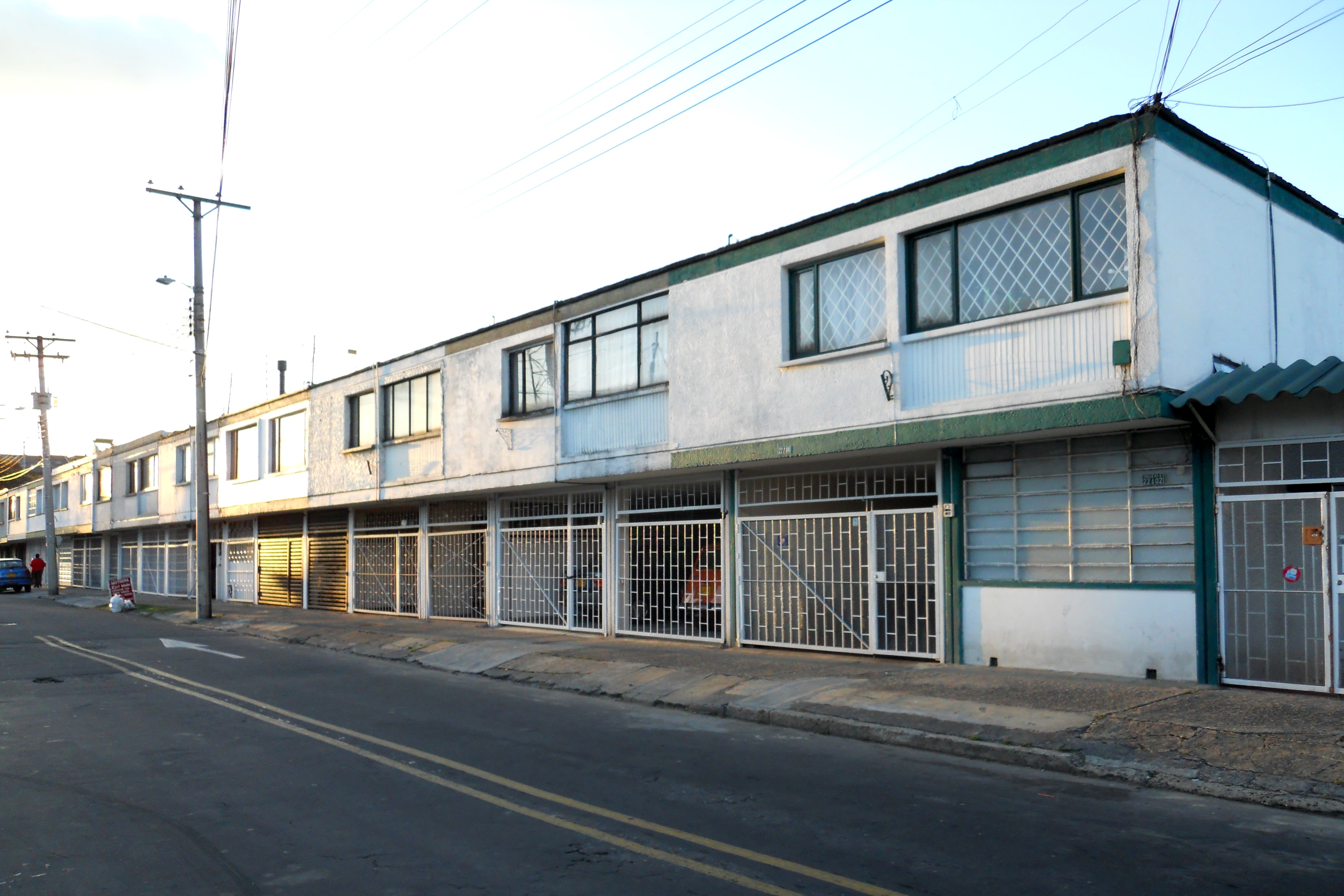 Diagonal 86 con transversal 32, barrio Polo Bogotá